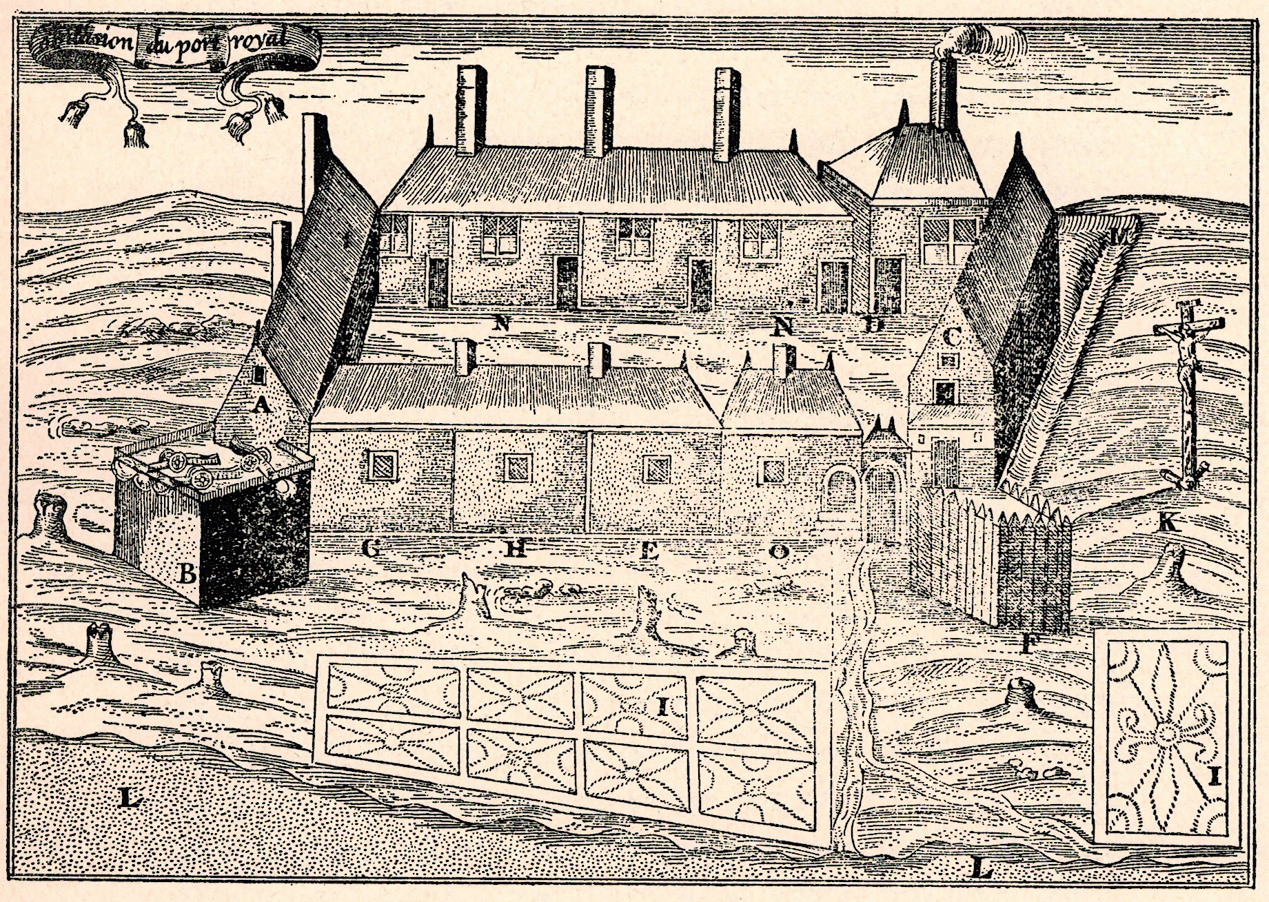 « abitasion du port royal », par Samuel de Champlain, 1613 A Logemens des artisans. B Plate forme où estoit le canon. C Le magasin. D Logement du sieur de Pont-gravé & Champlain. E La forge. F Palissade de pieux. G Le four. H La cuisine. O Petite maisonnette où l'on retiroit les utensiles de nos barques; que depuis le sieur de Poitrincourt fit rebastir, & y logea le sieur Boulay quand le sieur du Pont s'en revint en France. P La porte de l'abitation. Q Le cemetiere. (K) R La riviere. (L)